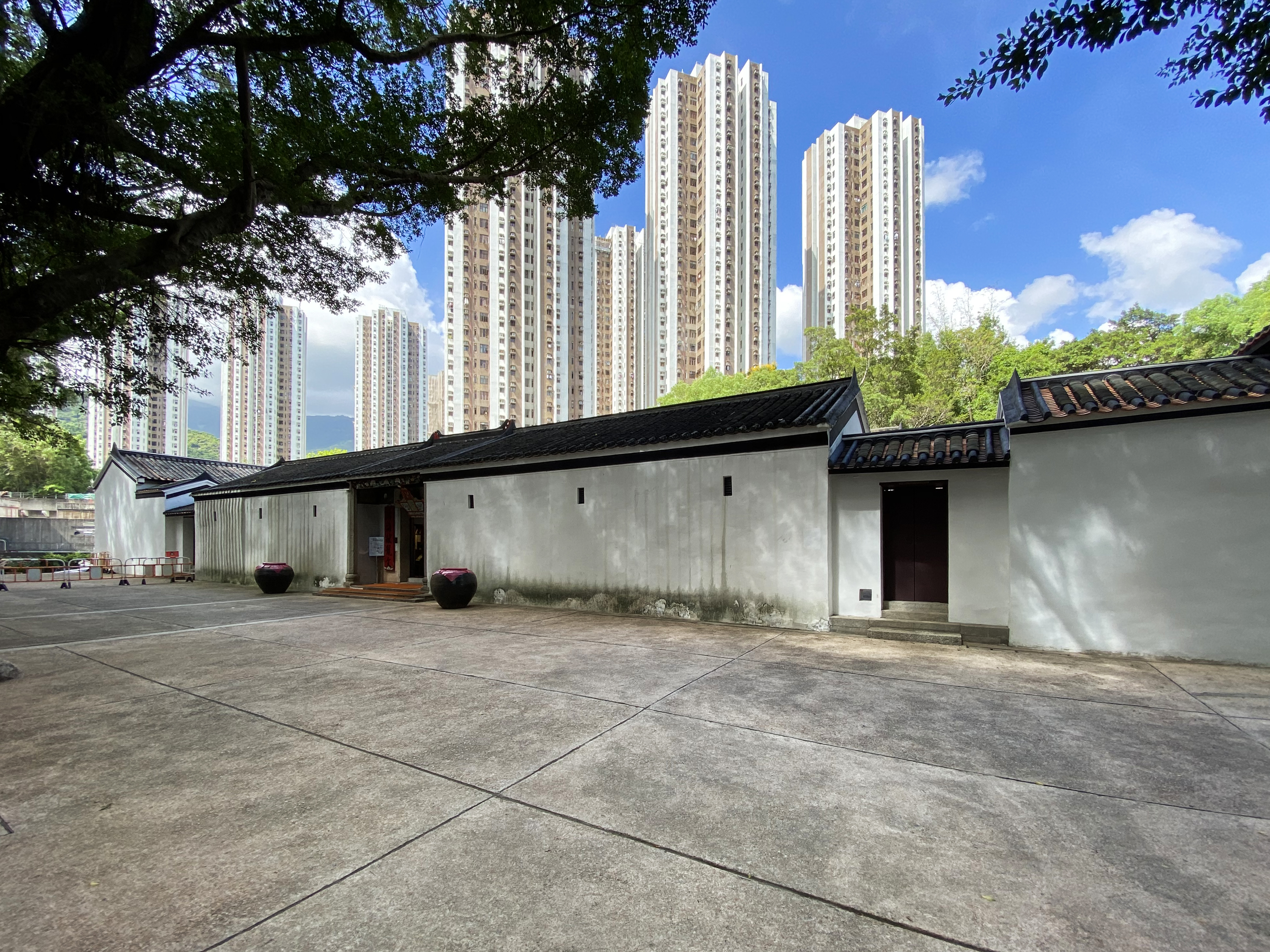 Sam Tung Uk